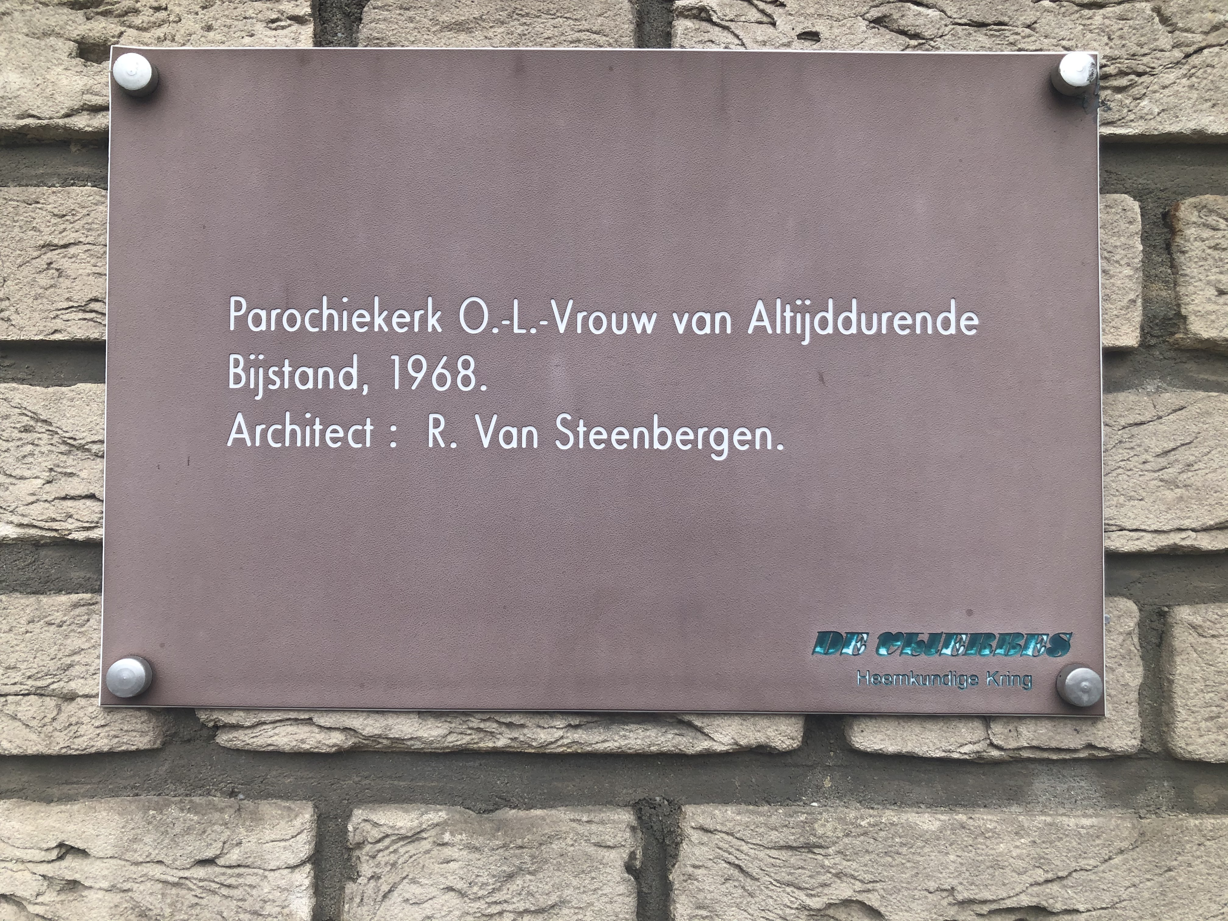 Bordje aan de parochiekerk Onze-Lieve-Vrouw Altijddurende Bijstand